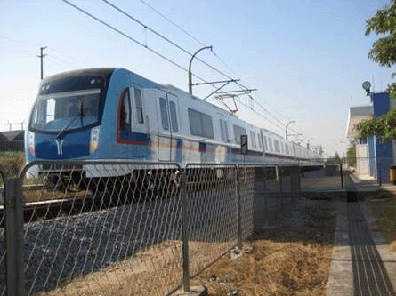 广州地铁5号线列车2009